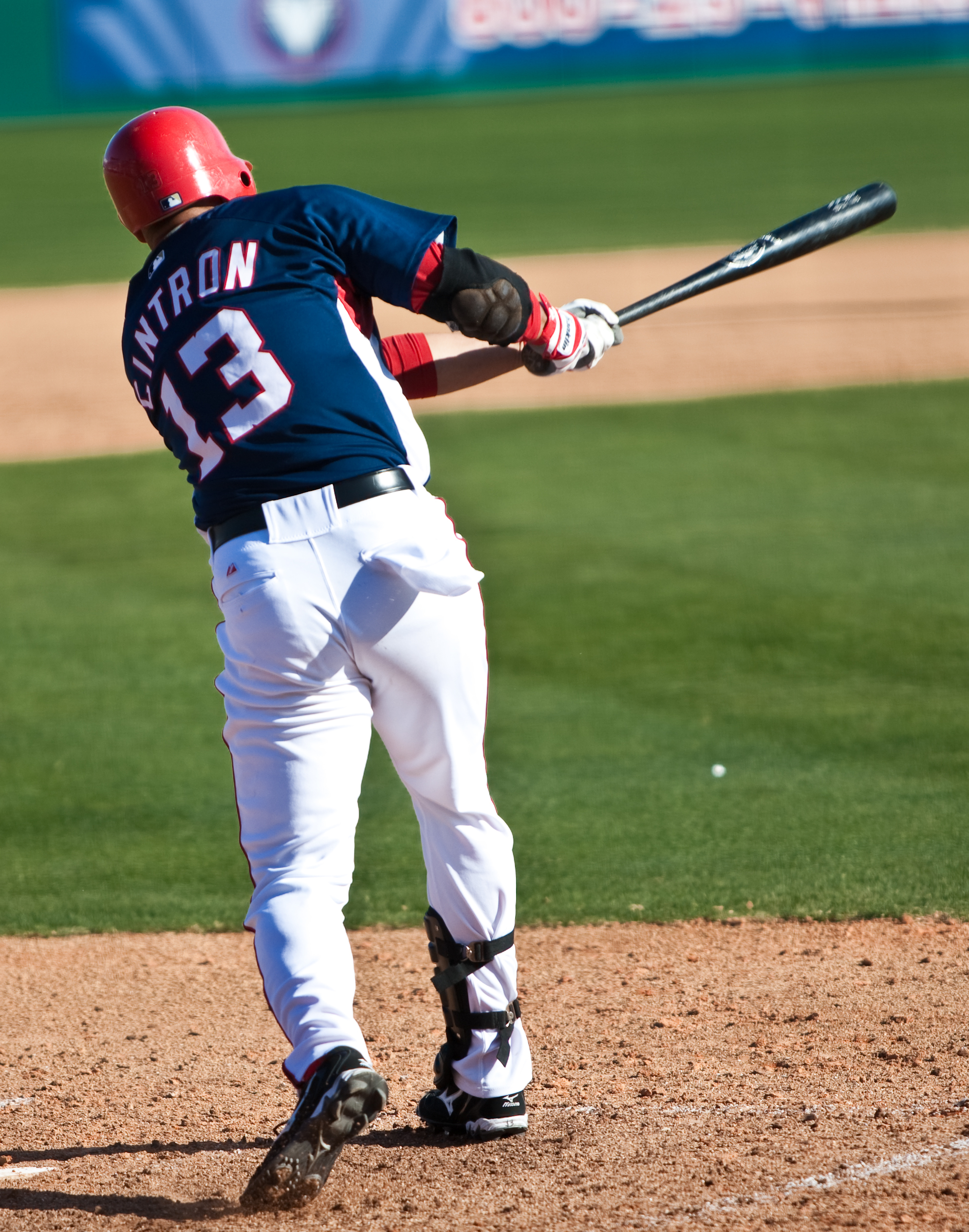 Alex Cintrón